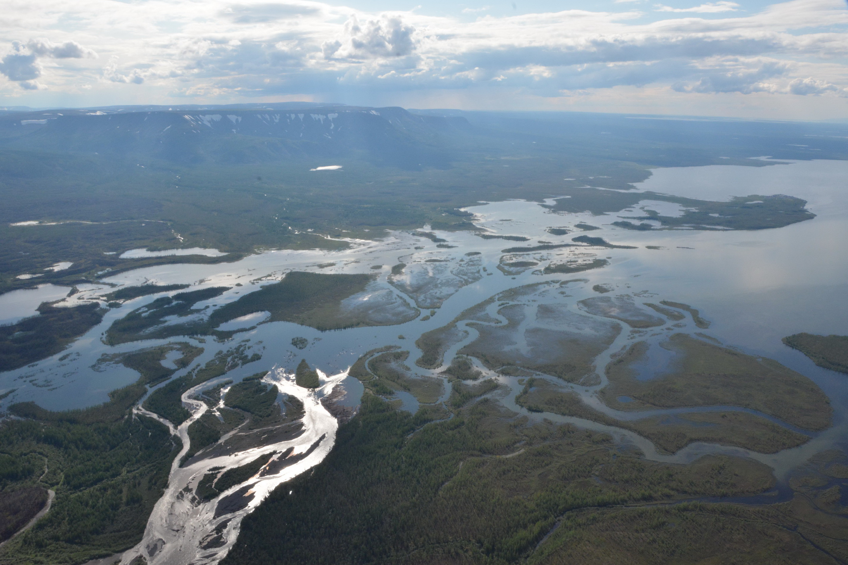 устье р.Хаканча